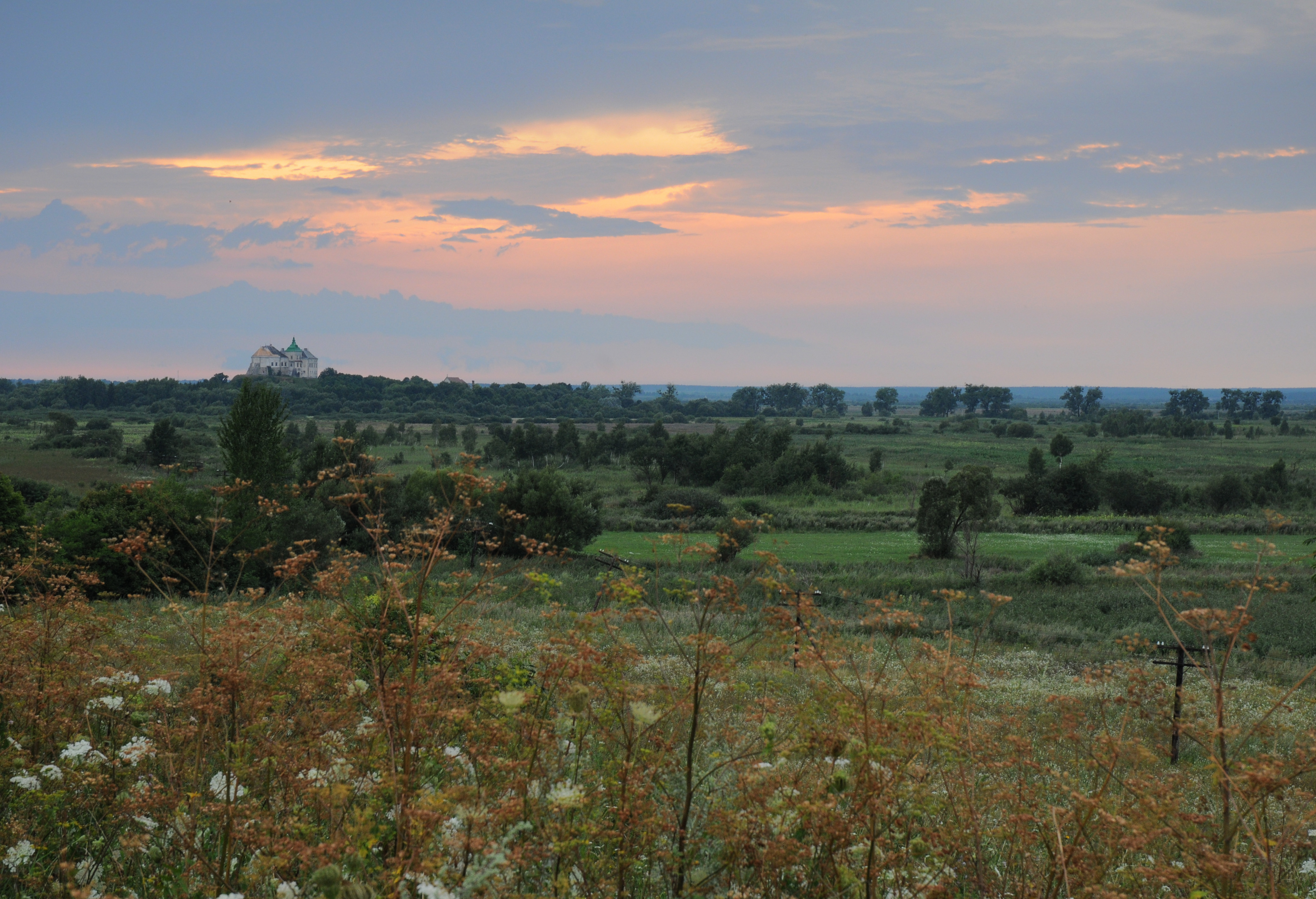 НПП "Північне Поділля", поблизу Олеська